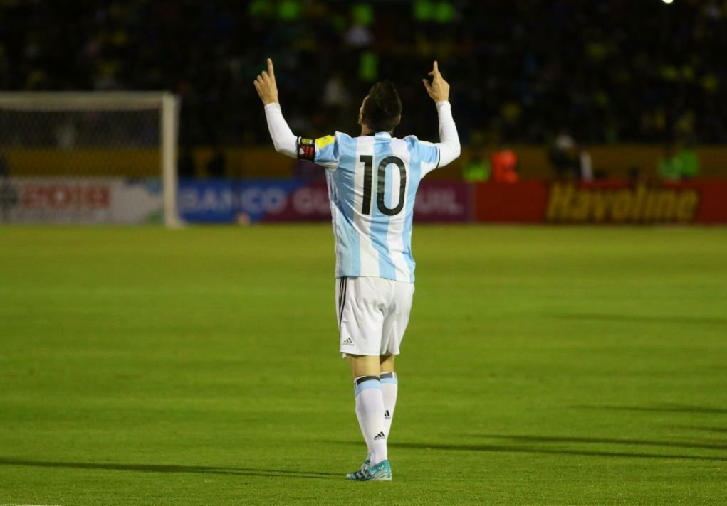 Quito, 10 oct (Andes).- Con tres tantos Argentina espantó los fantasmas de la eliminación, clasificó a su décima octava Copa del Mundo y venció 3-1 a un Ecuador que inició ganando el compromiso, disputado en el estadio Atahualpa de Quito, pero que no supo contener a uno de los mejores jugadores del mundo. ANDES/Micaela Ayala V.